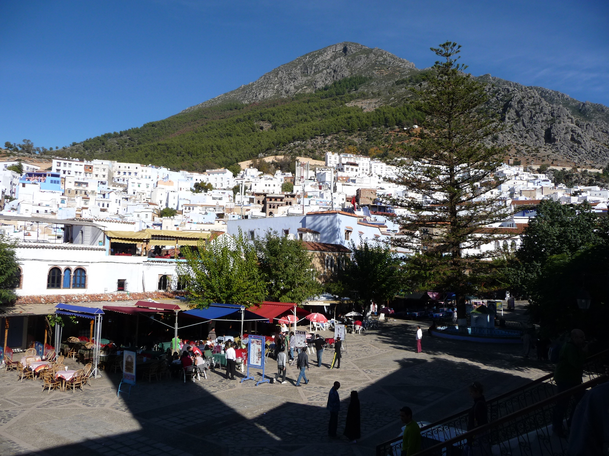 Shagen-P1050693.JPG